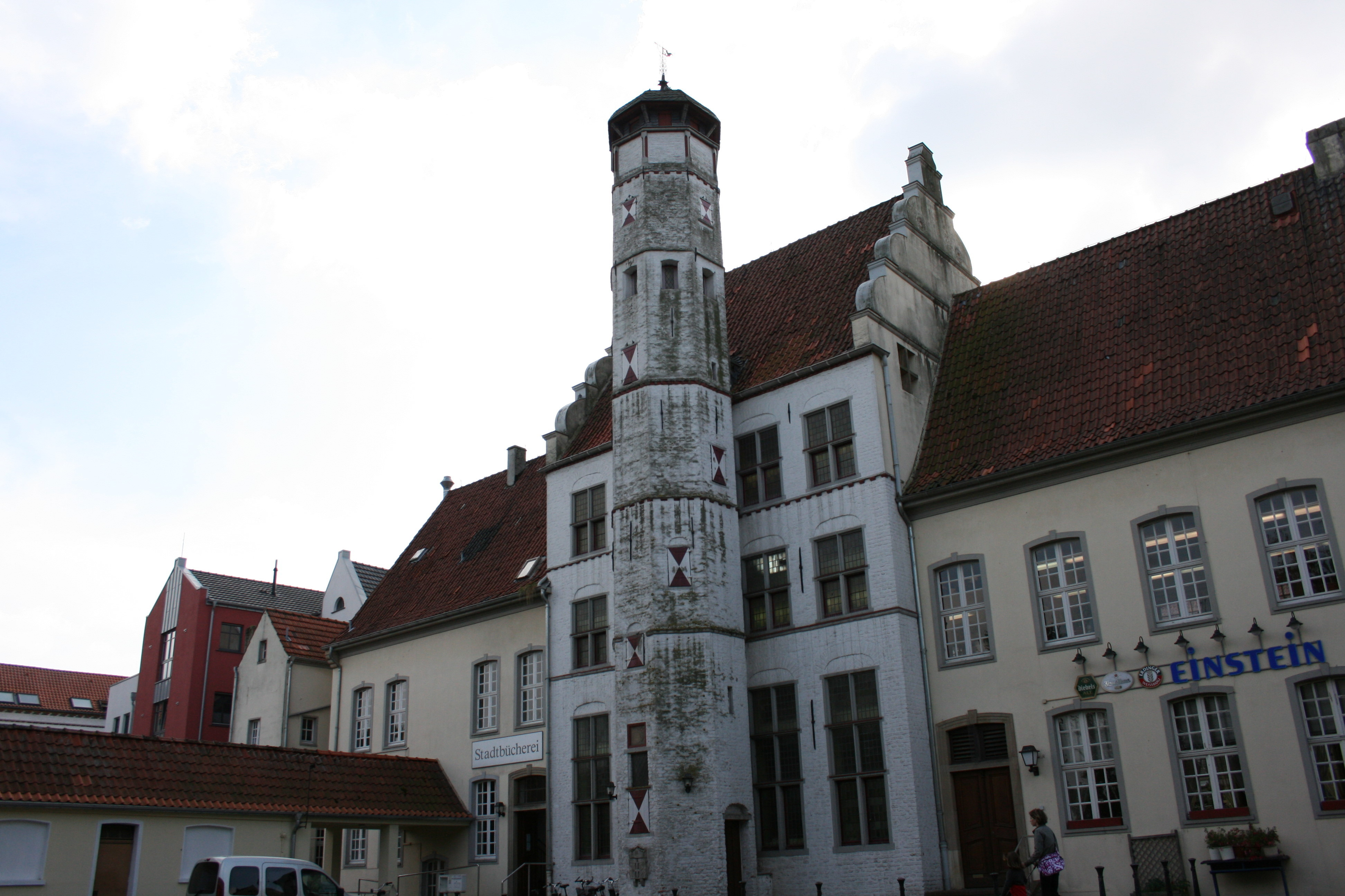 Altes Karthaus in der Straße Karthaus in Xanten